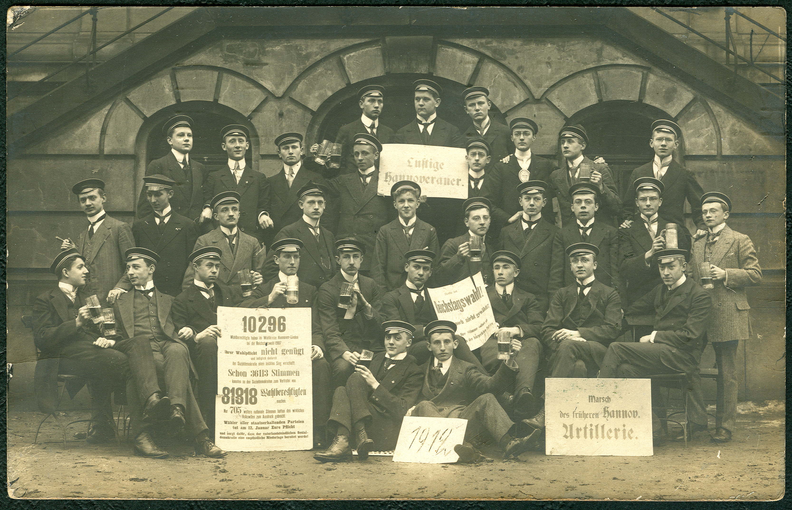 32 junge Männer, "Lustige Hannoveraner", posieren hier als "Abiturienten-Commers mit Wahlaufrufen, Plakaten und Bierkrügen zur Reichstagswahl 1912. Ihre politische Gesinnung demonstrieren die Behauptungen auf dem Plakat ganz links: „10296 Wahlberechtigte haben im Wahlkreise Hannover-Linden bei der Reichstagswahl 1907 ihrer Wahlpflicht nicht genügt und lediglich dadurch der Sozialdemokratie einen leichten Sieg verschafft. Schon 36113 Stimmen konnten so den Sozialdemokraten zum Vertreter von 81818 Wahlberechtigten machen. Nur 705 weitere nationale Stimmen hatten den wirklichen Volkswillen zum Ausdruck gebracht. Wähler aller staatserhaltenden Parteien tut am 12. Januar Eure Pflicht und sorgt dafür, dass der vaterlandsfeindlichen Sozialdemokratie eine empfindliche Niederlage bereitet werde.“ Den Aufruf an mögliche Nichtwähler der bürgerlichen Parteien wollten die offensichtlich gerade Volljährigen Schirmmützen-Träger, die hier an einem noch nicht identifizierten Treppenaufgang posieren, von einem "Marsch der früheren Hannov. Artillerie" begleitet wissen - nämlich der des Königreichs Hannover anstelle der nun preußischen Artillerie - und geben sich damit überwiegend als Parteigänger um die Deutsch-Hannoversche Partei zu erkennen ...